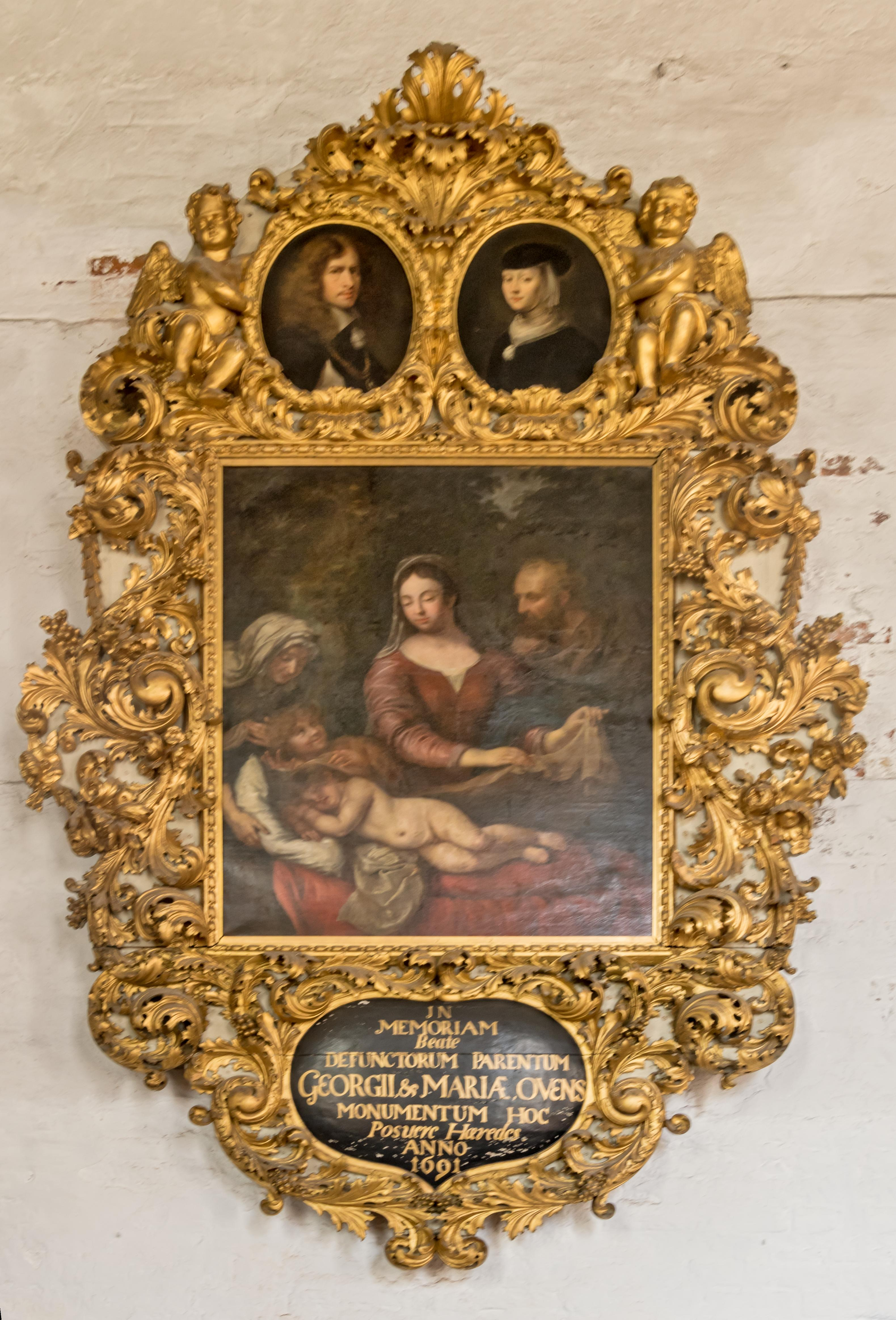 Bilder aus Tönning Die St. Laurentius Kirche in Tönning, Bilder von innen und außen; hier Epitaph Jürgen Ovens mit Selbstporträt und seinem Porträt seiner Ehefrau über der Heiligen Familie von seiner Hand. Alles in einem ovalen Rahmen mit Akanthus-Schnitzerei des Hamburger Bildhauers Henrich Roelcke.